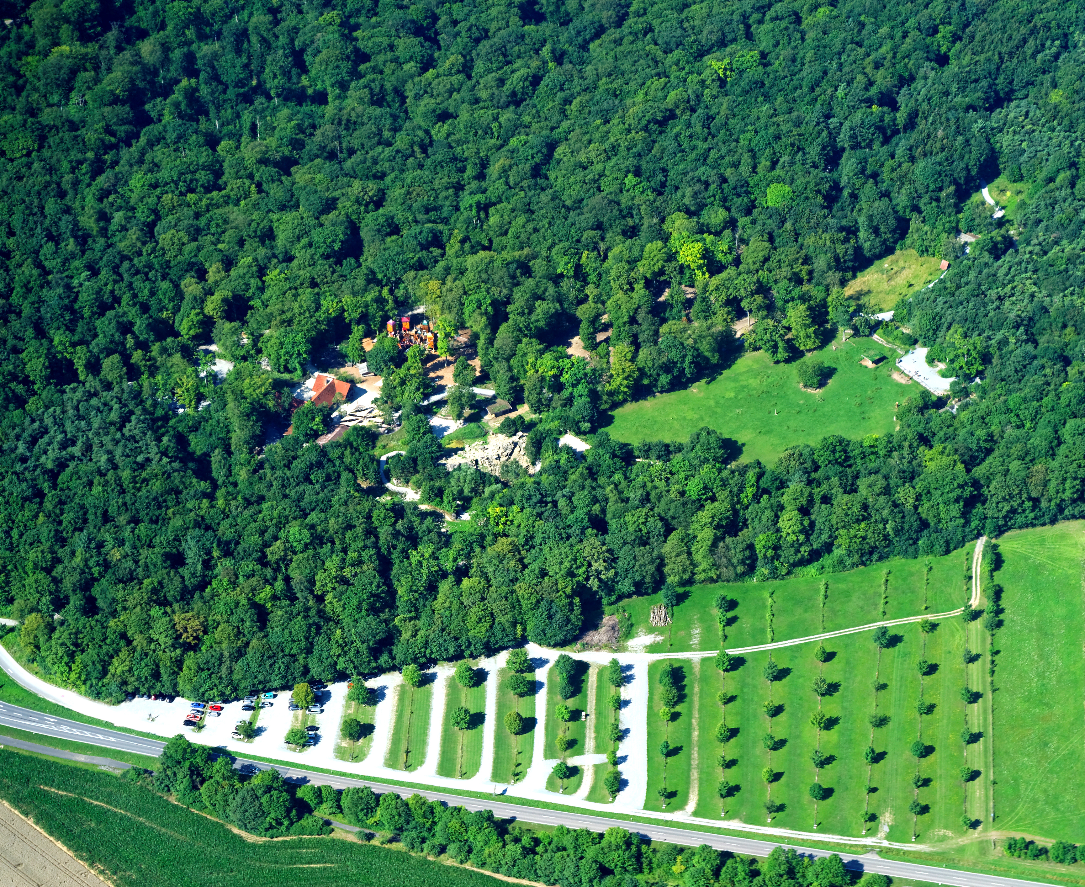 Ein guter Platz für wilde Tiere,der Wildpark in Bad Mergentheim.